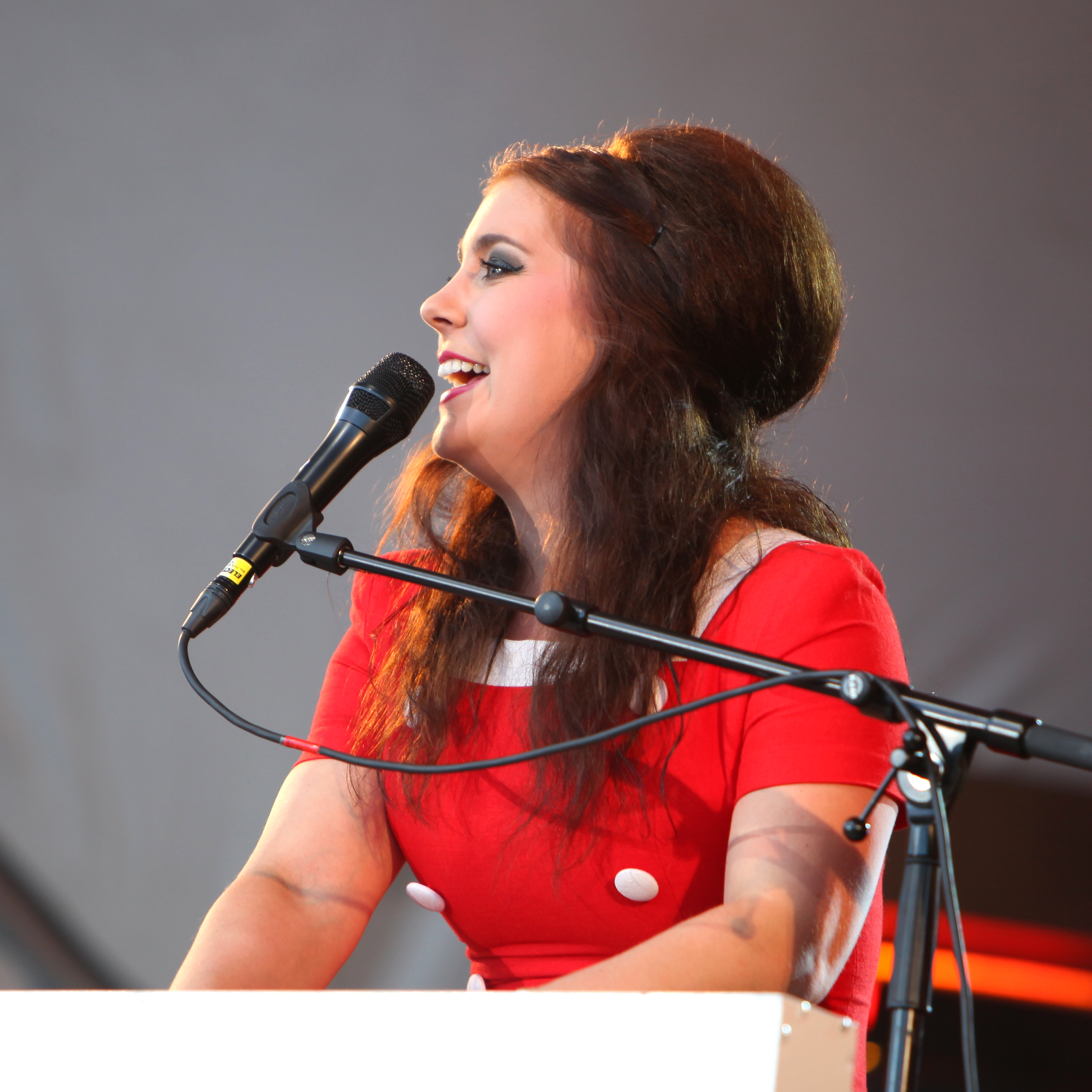 Miss Li at Stockholm Pride 2009